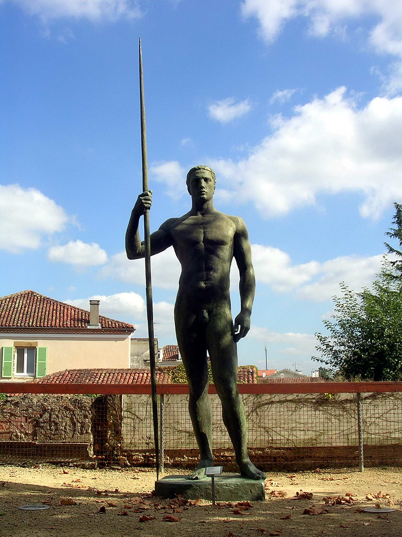 "Athlète au javelot" ou "Hercule", oeuvre du sculpteur Robert Wlérick, réalisée de 1939 à 1943, en bronze et fonte, 3,30*1,23*0,70 m, commandée par la ville de Paris en 1938. Dépôt du Musée d'Art Moderne de la ville de Paris en 2007. L'oeuvre est ici exposée à l'extérieur du musée Despiau-Wlérick de Mont-de-Marsan.